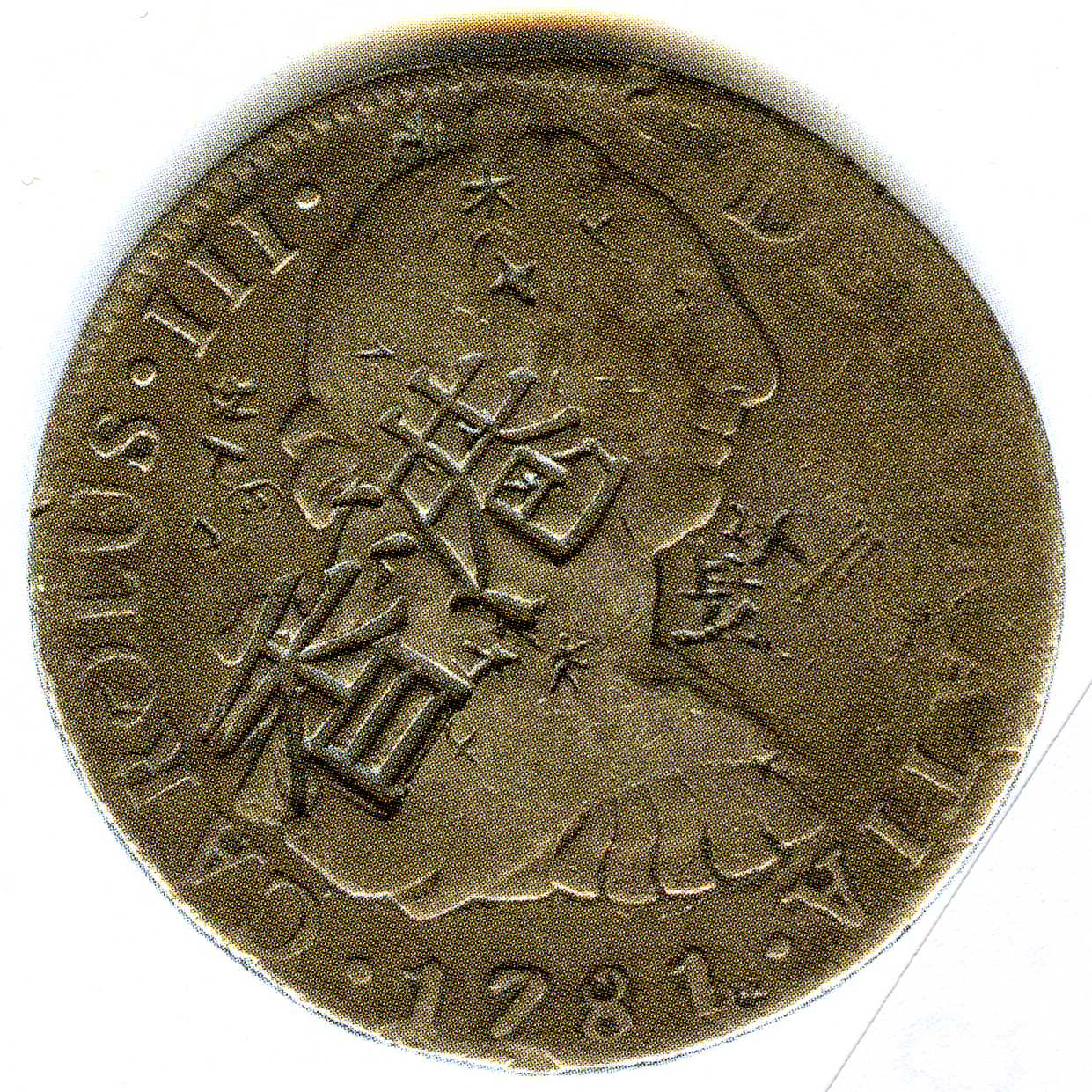 Moneda española empleada en Hong Kong